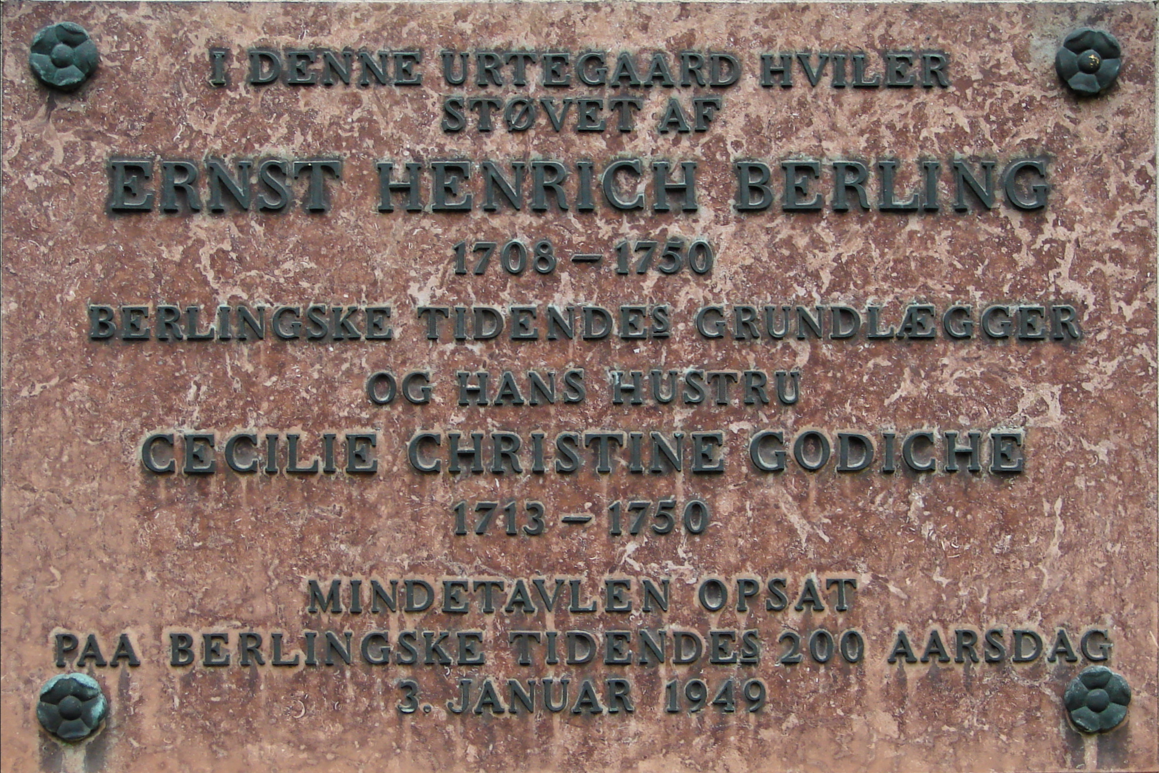 Mindetavle over Ernst Henrich Berling, grundlægger af avisen Berlingske Tidende, Nye Urtegård ved Sankt Petri Kirkes gravkapeller, København